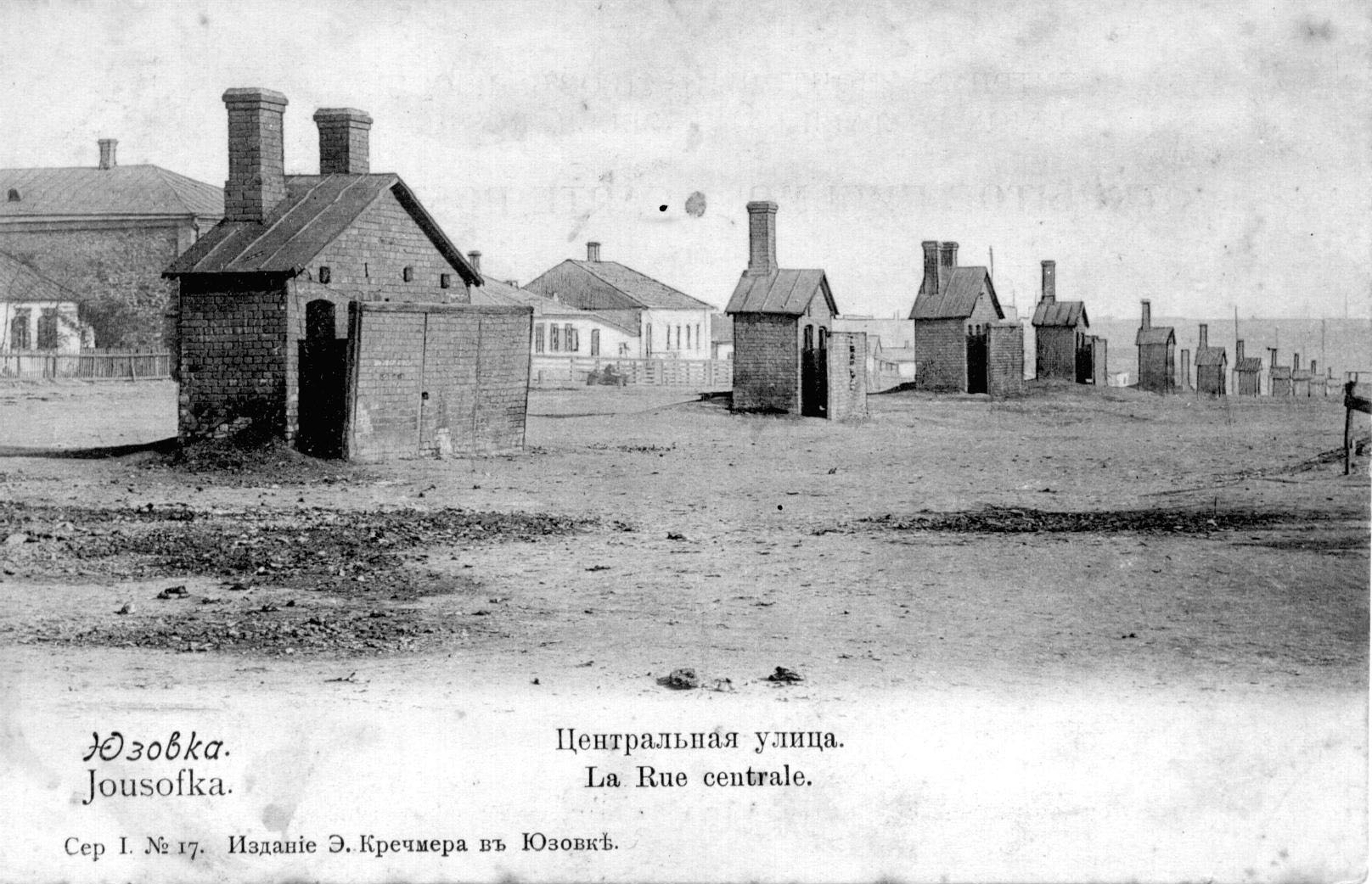 Центральная улица